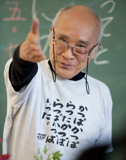 15 de Diciembre, 1931, Tokio, Japón. Es uno de los poetas contemporáneos más importantes y más leídos de Japón